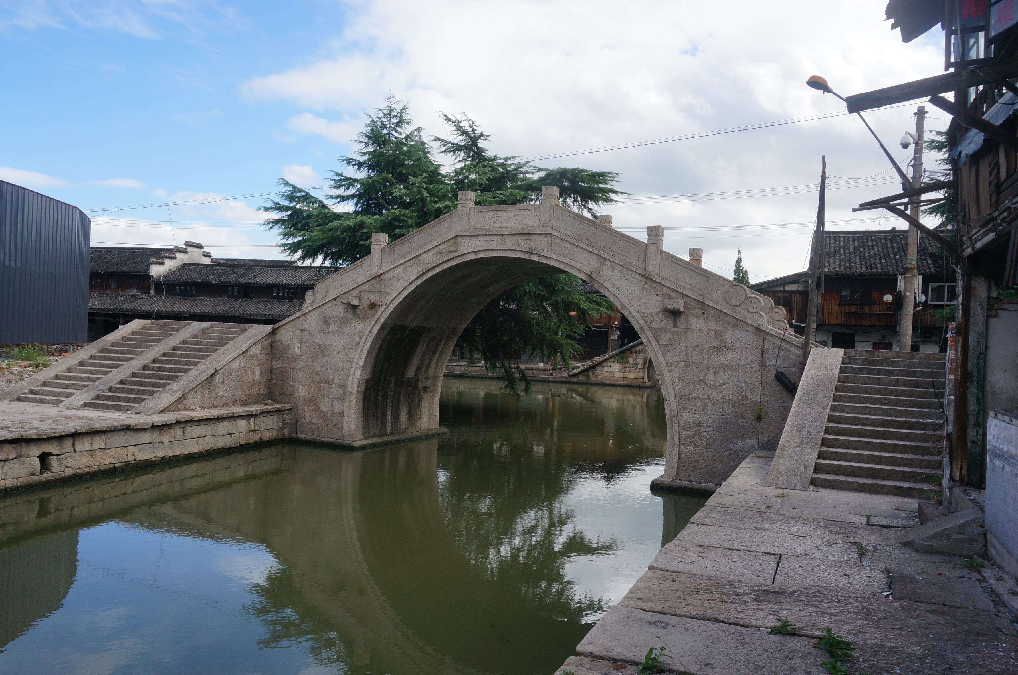 绍兴柯桥，南侧。